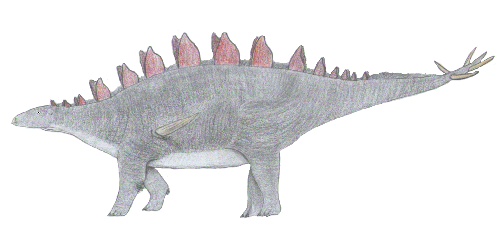 Recreación de Lexovisaurus durobrivensis